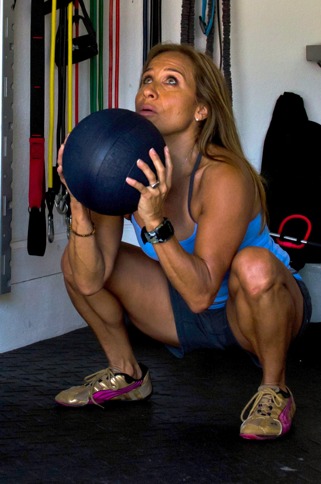 Entrenamiento pelota medicinal